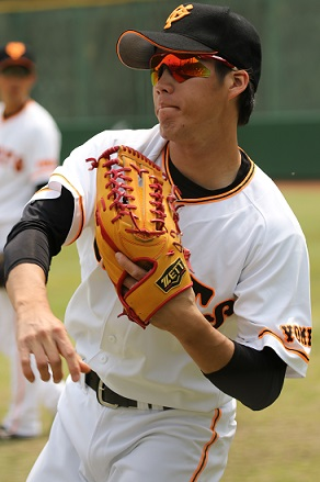 ジャイアンツ重信選手